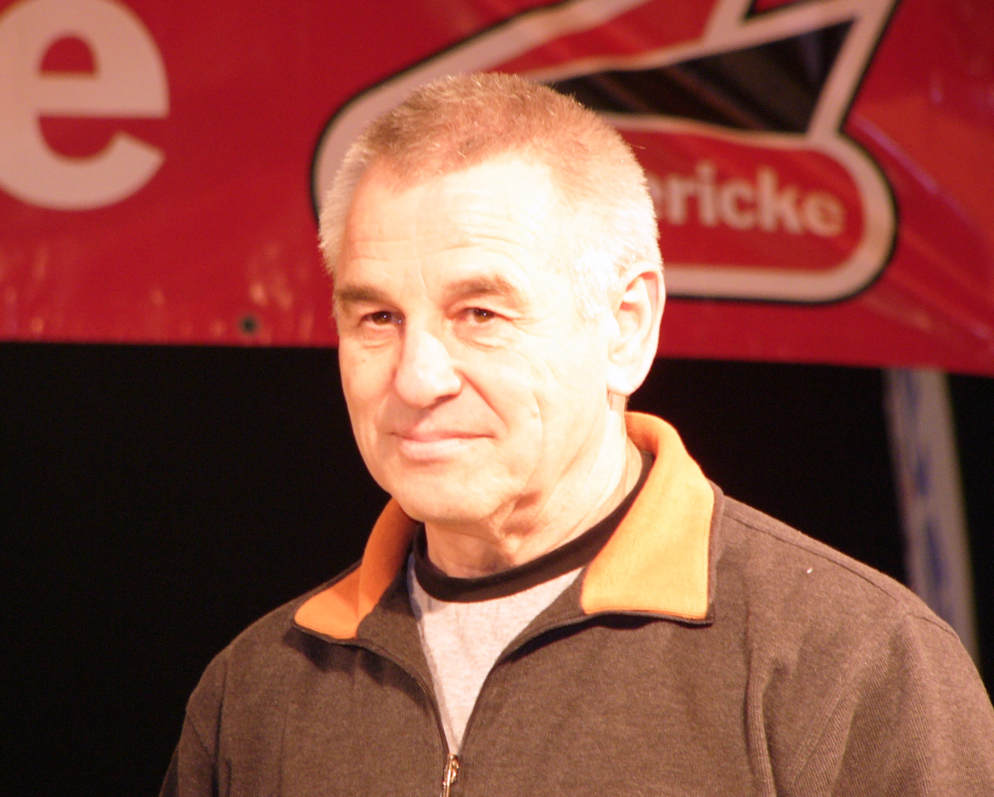 Anton (genannt Toni) Mang (aufgenommen auf der Bikermesse in Chemnitz 2008)